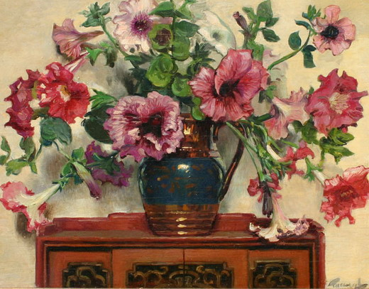 Квітковий натюрморт роботи художника Фредеріка Джада Вога, експонат Галереї Коулі